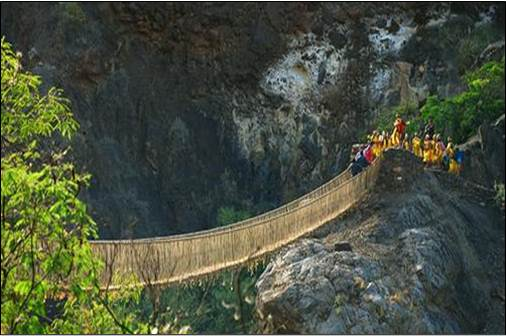 Este puente está tendido sobre el río Yanamayo yana=negro, mayu=rio, es decir rio negro, conecta el distrito de Llama con el distrito de Yauya (ancash, Perú) , es atravesado por el Camino del Inca.